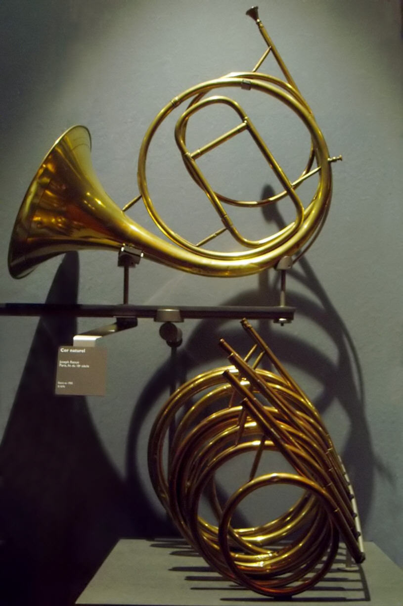 Cor naturel à tons de rechange, et ses différents tons - Joseph Raoux, Paris, fin du XVIII - Paris, musée de la musique (reworked by smial)